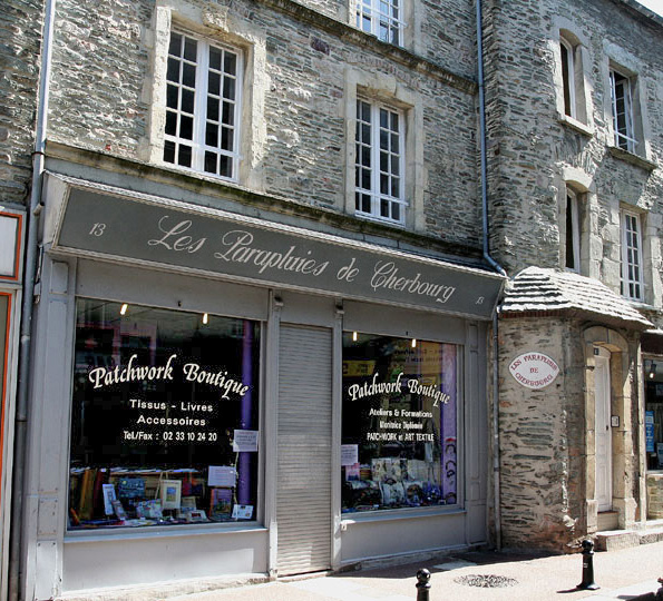 Façade du magasin utilisé pour le tournage du film Les Parapluies de Cherbourg.